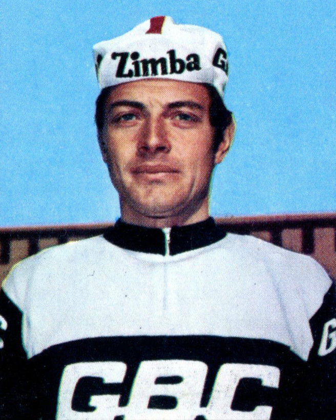 Figurina/Sticker CAMPIONI DELLO SPORT 1968/69 - n. 202 - R. MAURER -SVI-New